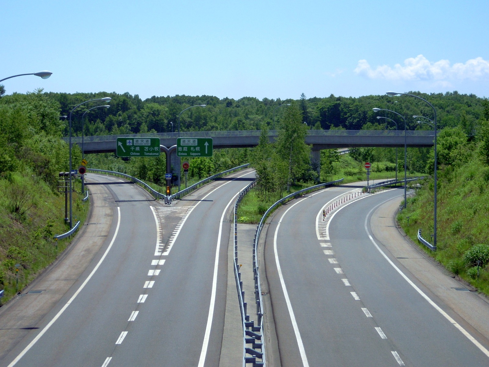 北海道千歳市にある道央自動車道／道東自動車道の千歳恵庭ジャンクションを道東道帯広方面からJCT分岐方向に向けて。画像中央を左右に横断する跨道橋は、ランプウェイではなく、上長都第一跨道橋（一般道）